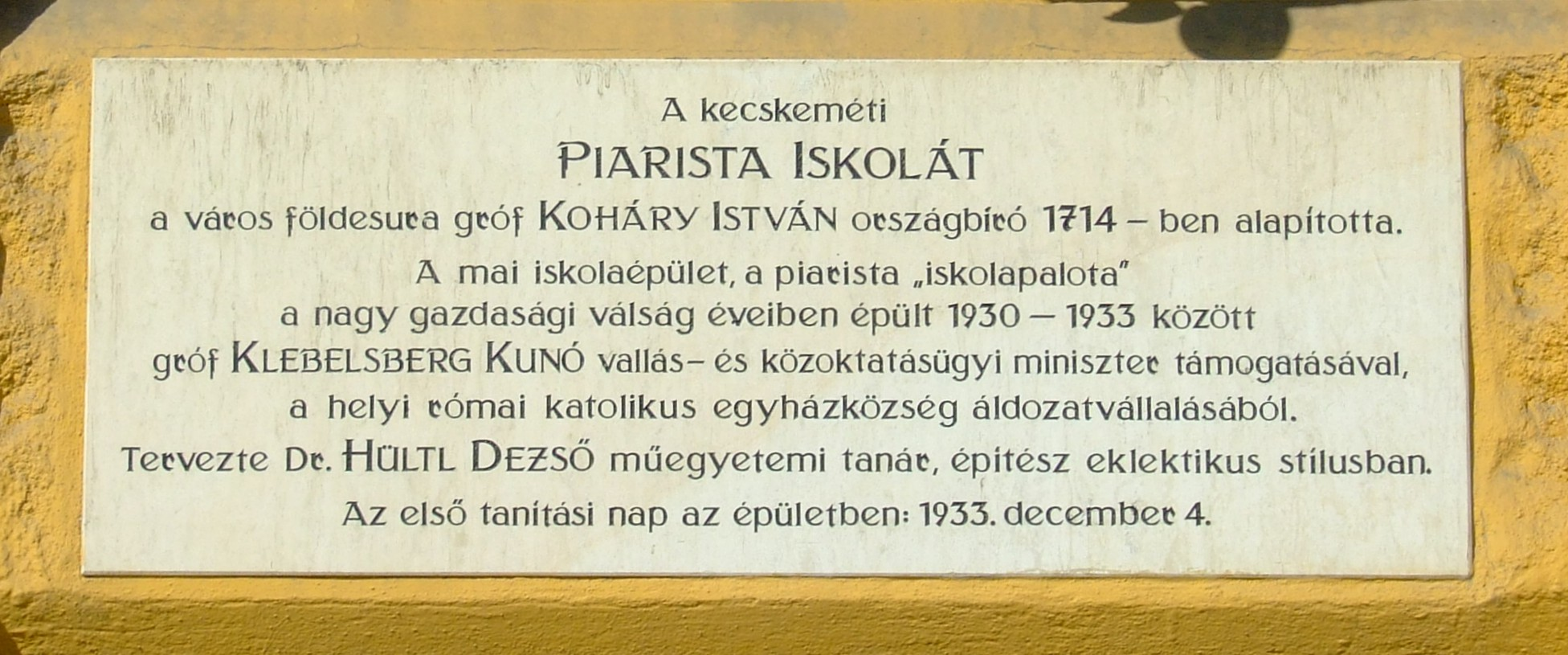 Emléktábla a kecskeméti piarista iskola falán